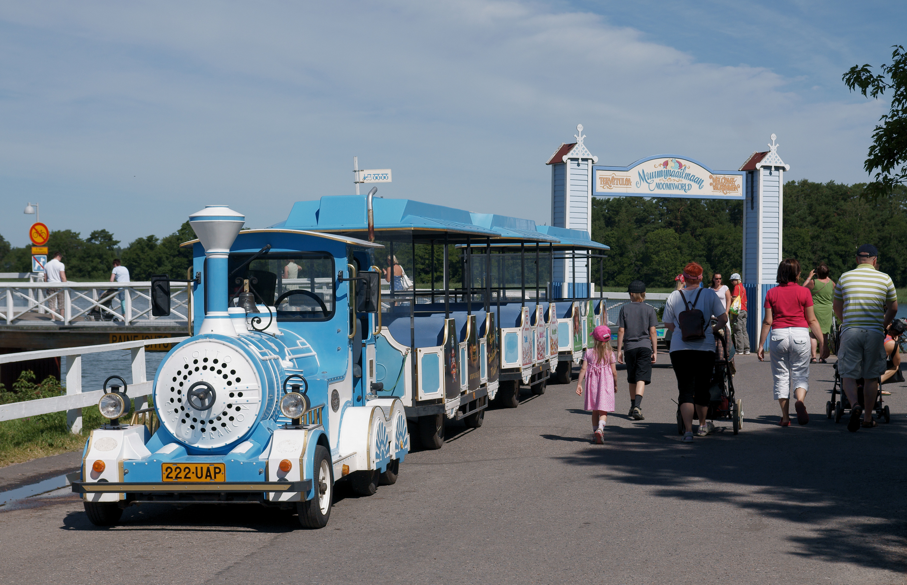 Muumijuna ponttoonisillan edustalla.